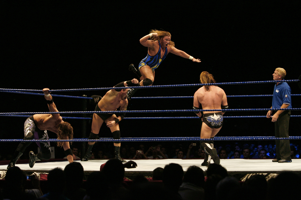 Wrestling in Pavilhão Atlântico arena in Lisbon, Portugal